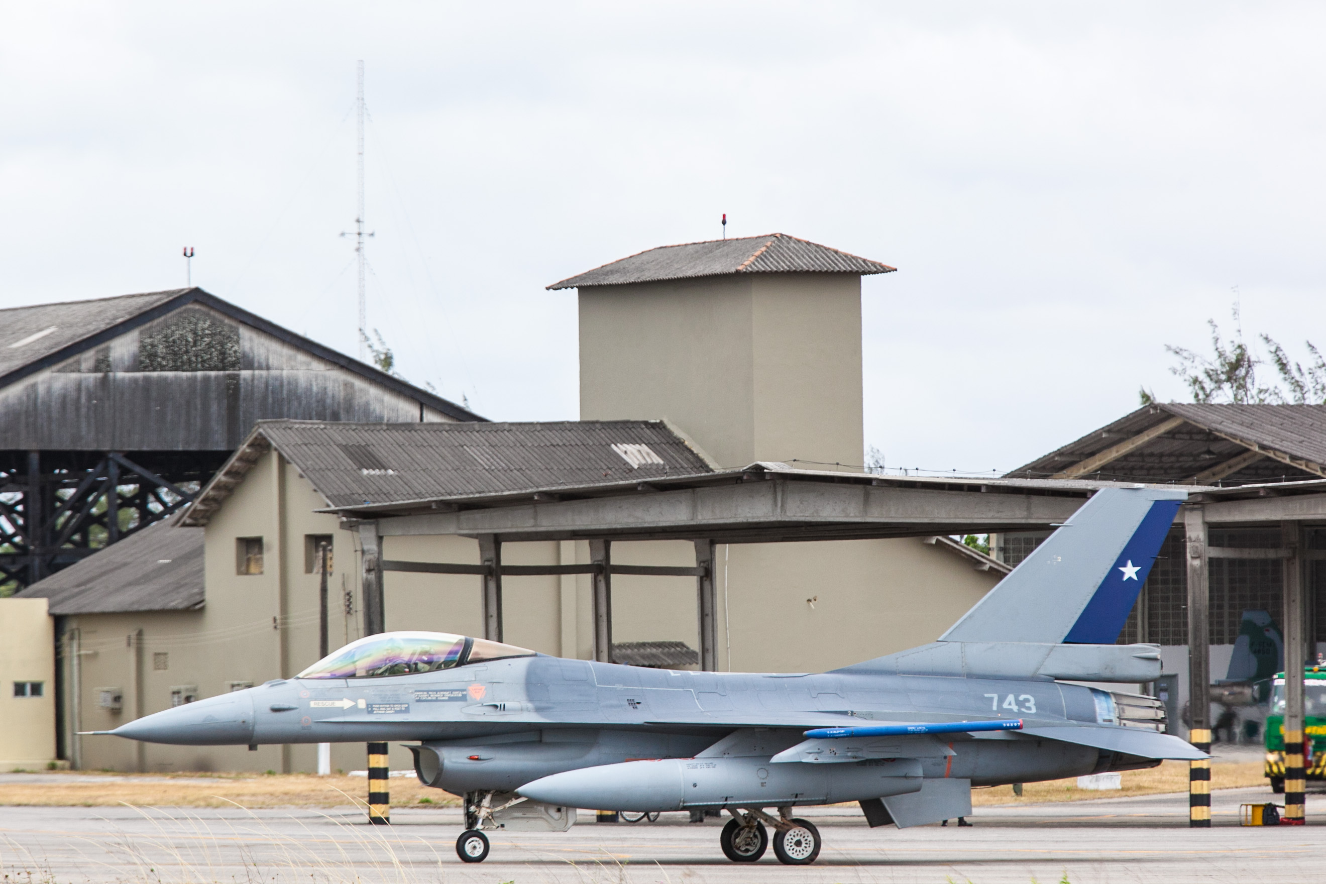 Fotos Felipe Barra/MD